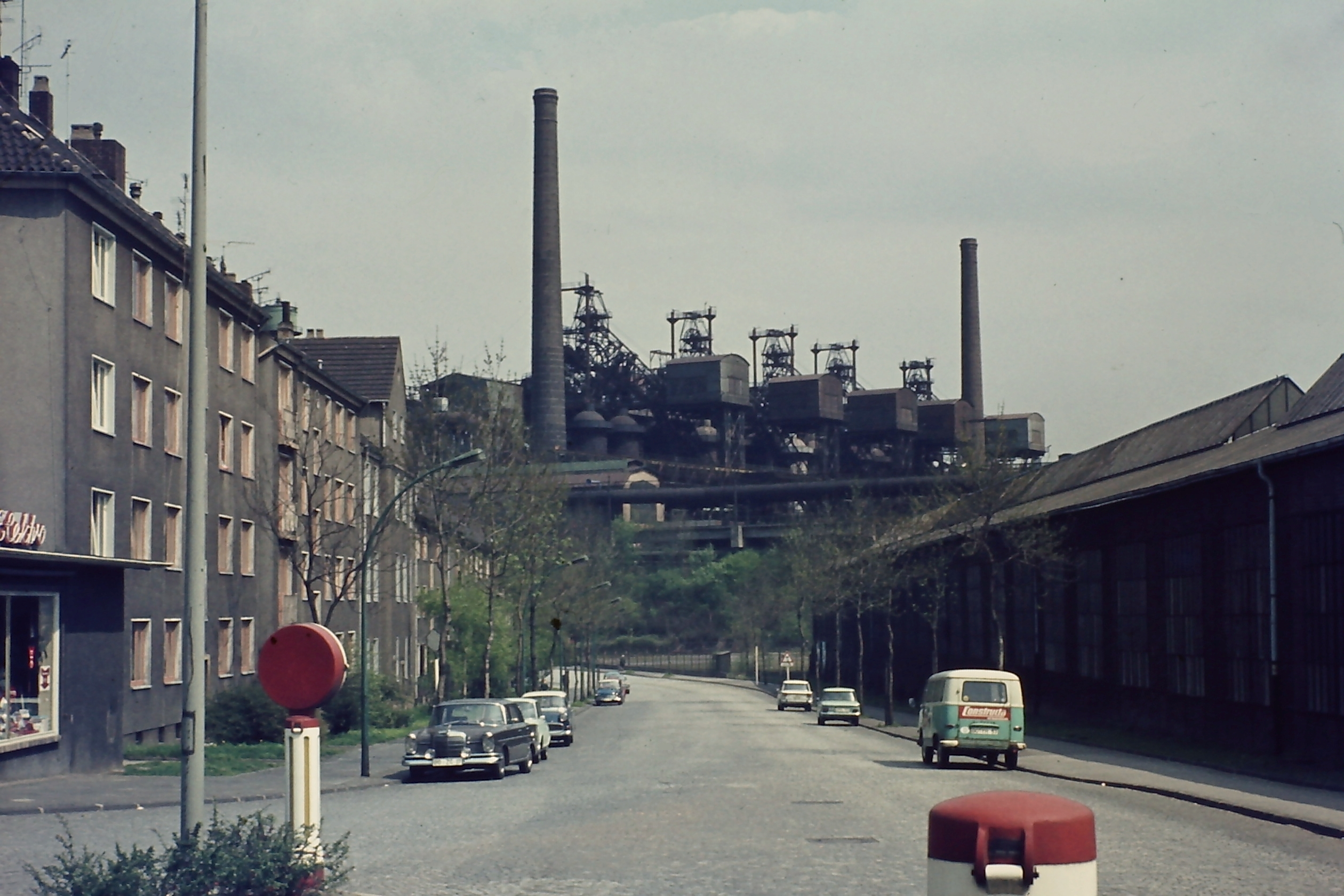 Blick von der Gahlenschen Straße auf die Hochöfen des Bochumer Vereins um 1962